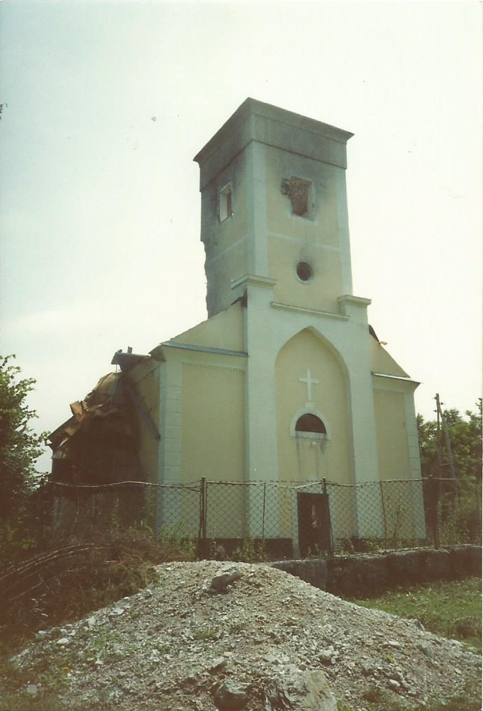 Razrušena crkva u Ličkom Novom s prednje strane (kolovoz 1992)